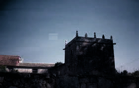 pazo de torre en galicia